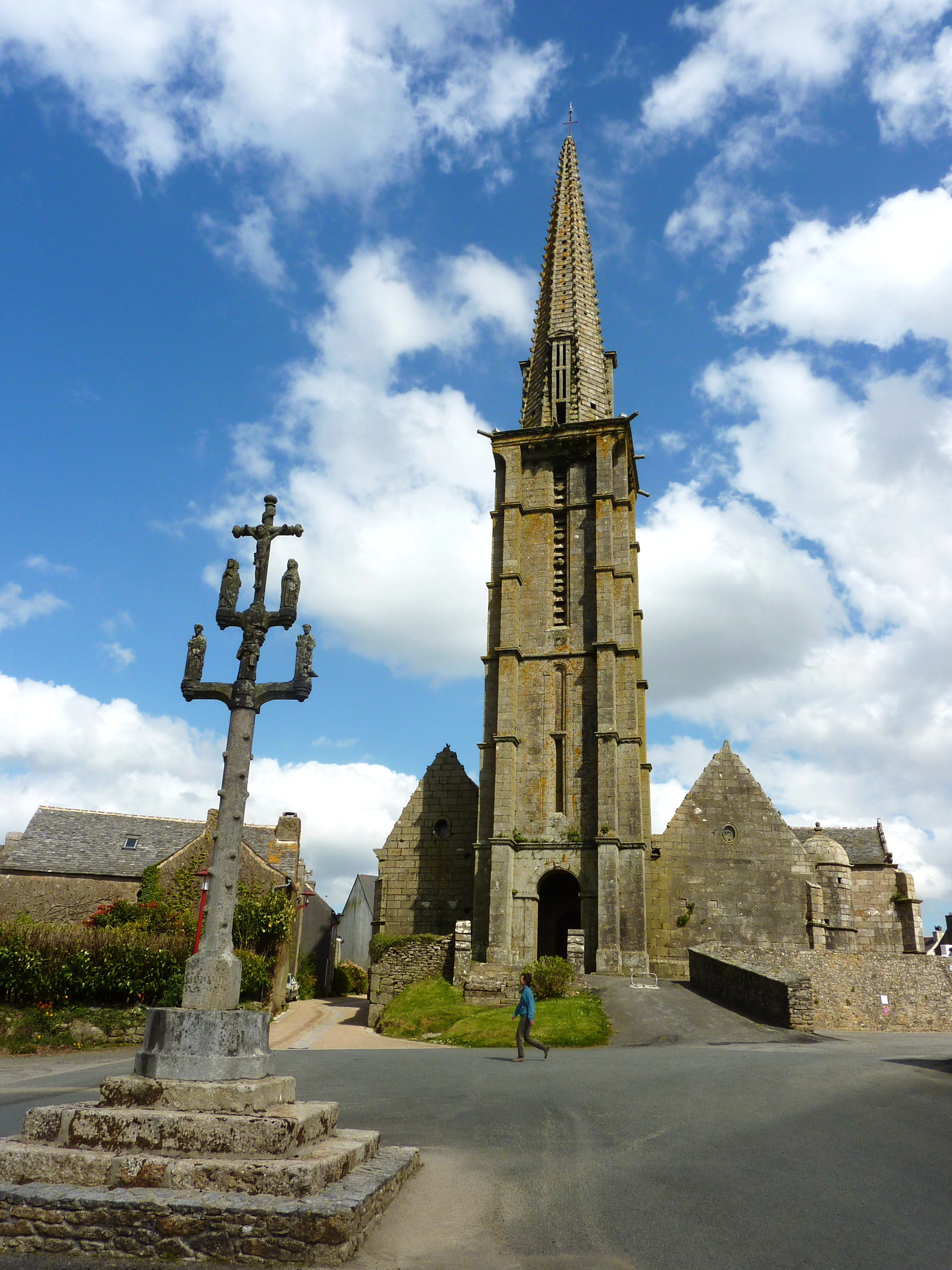 Calvaire ouest et église paroissiale Saint-Yves de Plounéour-Menez. Le calvaire date de 1641, mais le fût semble dater de 1896.Site info Bretagne